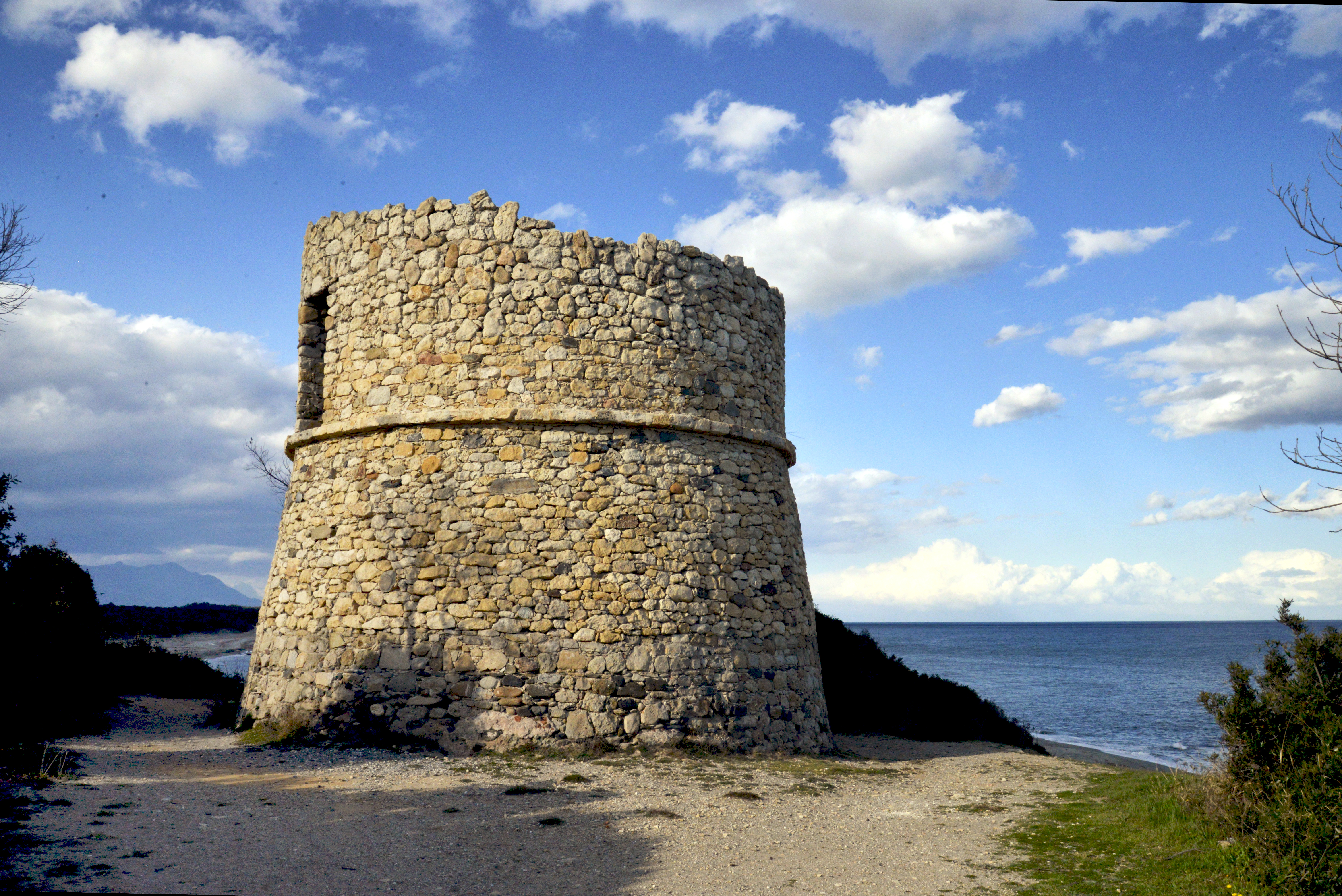 Aléria, Haute-Corse - La tour génoise de Diana, dominant le grau de l'étang.